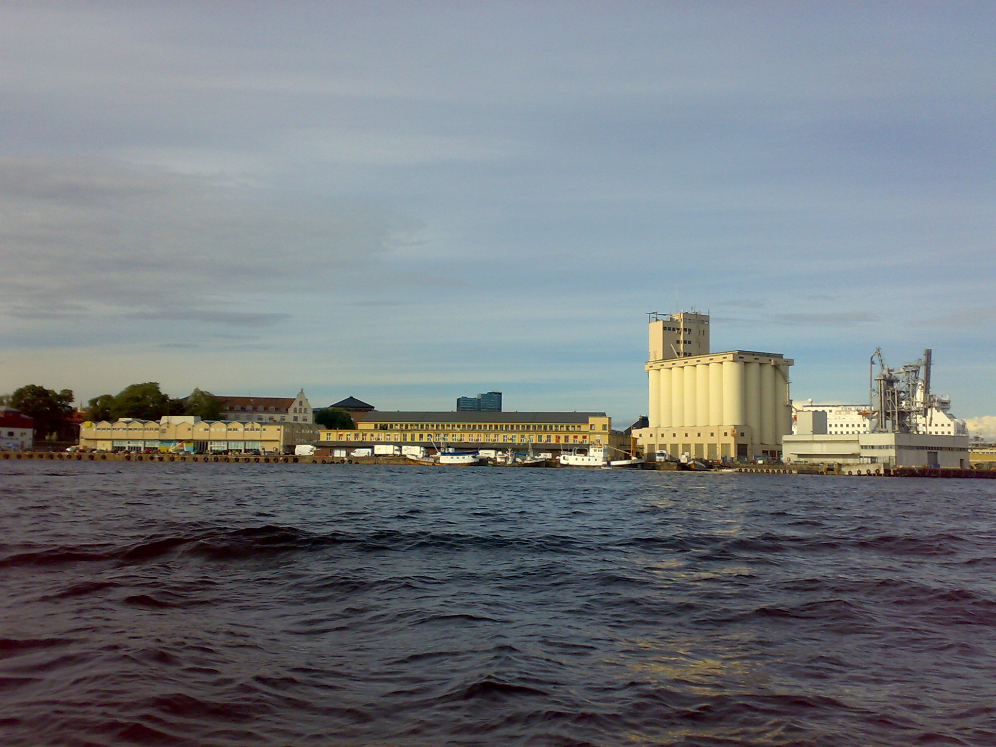 Norsk (bokmål): Vippetangen sett fra Bjørvika-siden, Oslo